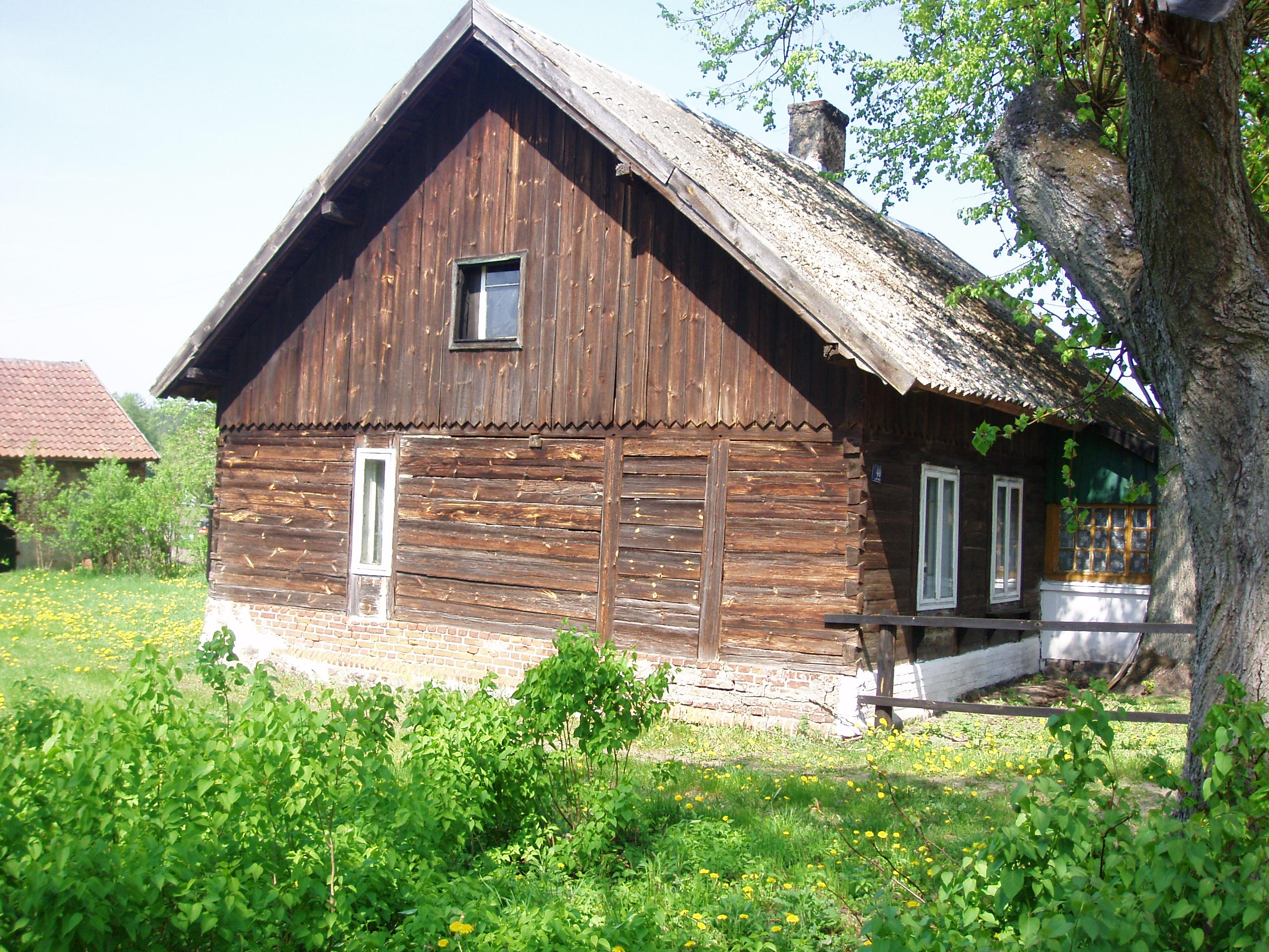 Nowa Wieś, chałupa mazurska